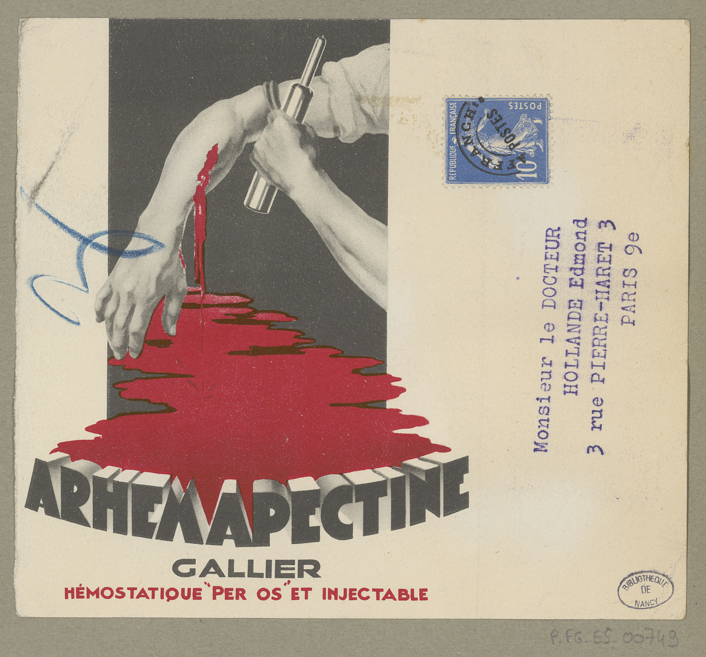 Date incertaine. Collé sur le même support que le document P-FG-ES-00748